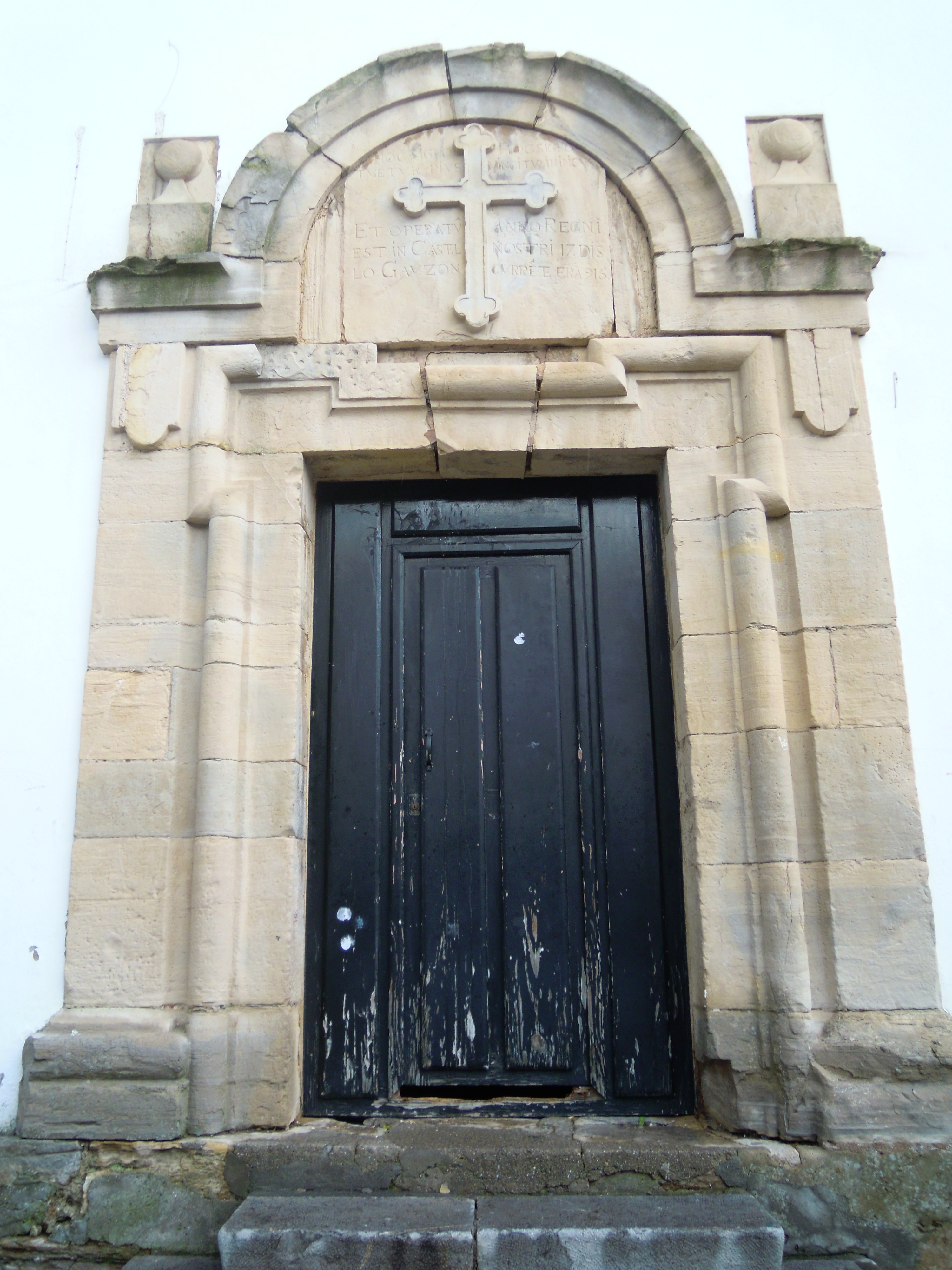 Torre del Reló (Lluanco)